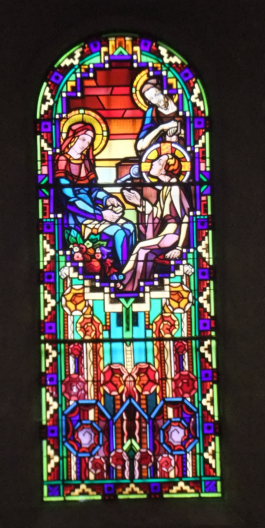 Vitrail du fond de l'abside de l'église de Saint-Pierre d'Allevard,. Autrefois masqué par un imposant maître autel, il n'est bien visible que depuis l'aménagement du chœur de 1996. Créé par l'Atelier Bessac, maître-verrier de Grenoble (signature en bas à gauche), installé en 1934 (date et lieu en bas àdroite) il représente, dans le tiers bas un bouquet de roses stylisées dans style Art déco et au dessus, la sainte famille dans l'atelier de Joseph : Marie, assise à gauche et Joseph debout, appuyé sur son outil, ont cessé leur activité, suspendus aux lèvres de Jésus, assis en face de sa mère.